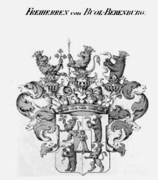 Wappen Buol Bernburg - Tyroff AT.jpg vergrößert